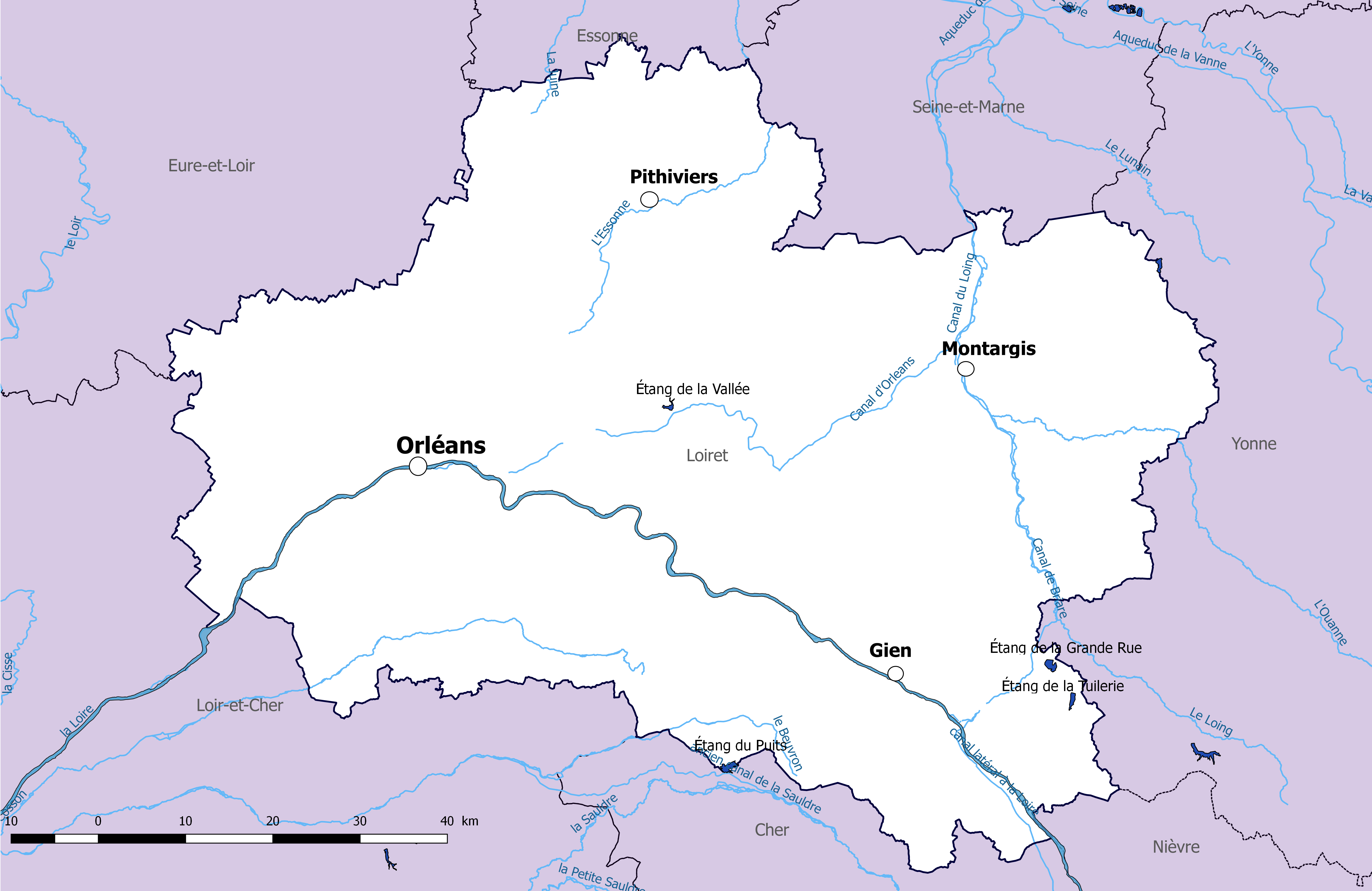 Carte du réseau hydrographique du Loiret (France) avec représentation des plans d'eau.